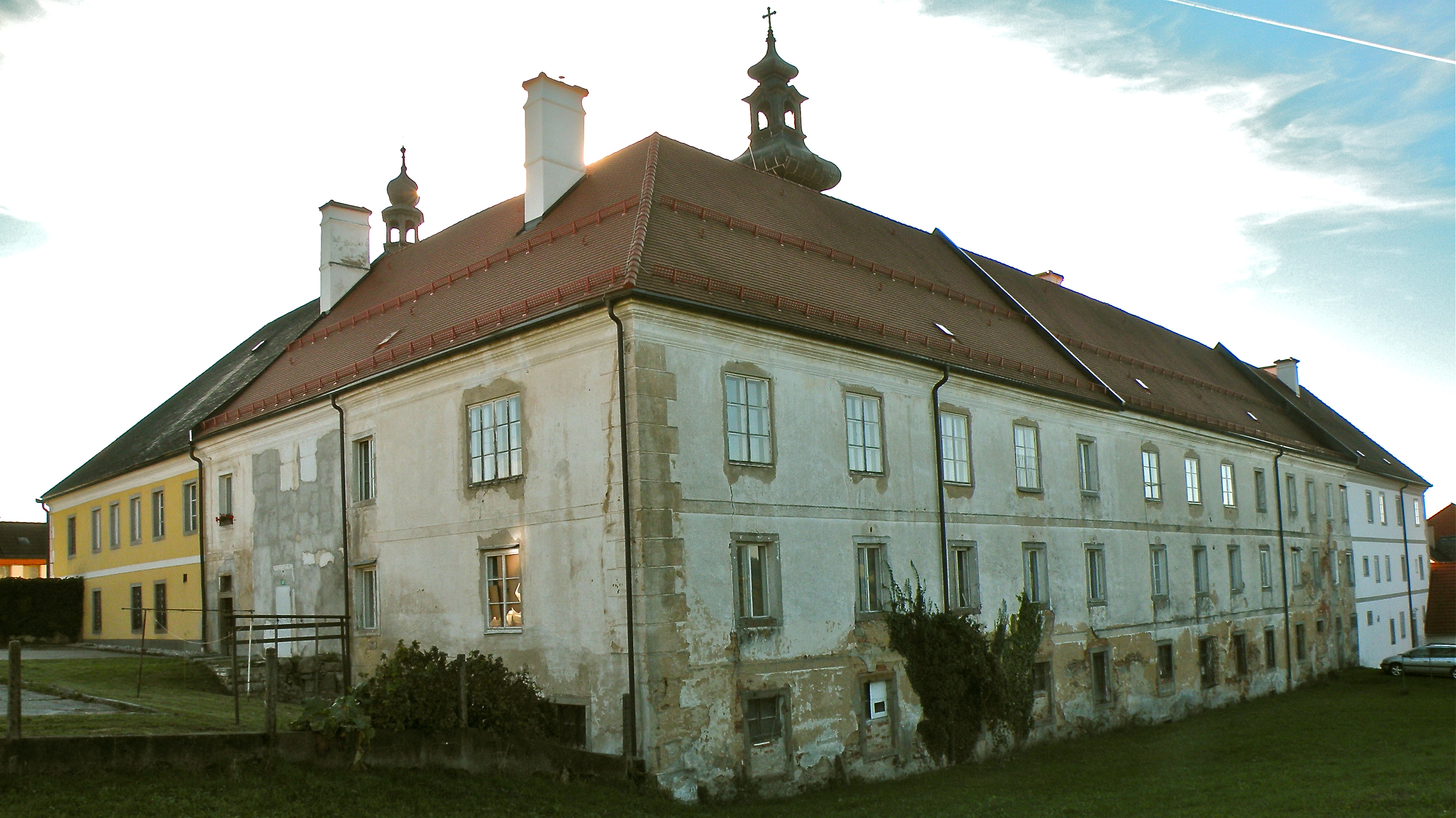 Dominikanerkloster in Münzbach im Bezirk Perg in Oberösterreich